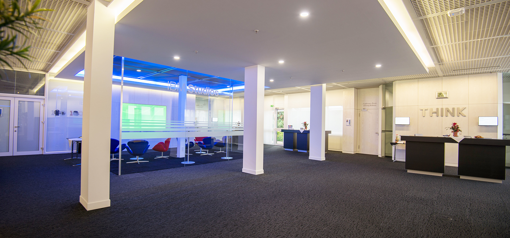 Vorraum des Client Center im deutschen IBM Forschungs- und Entwicklungszentrums